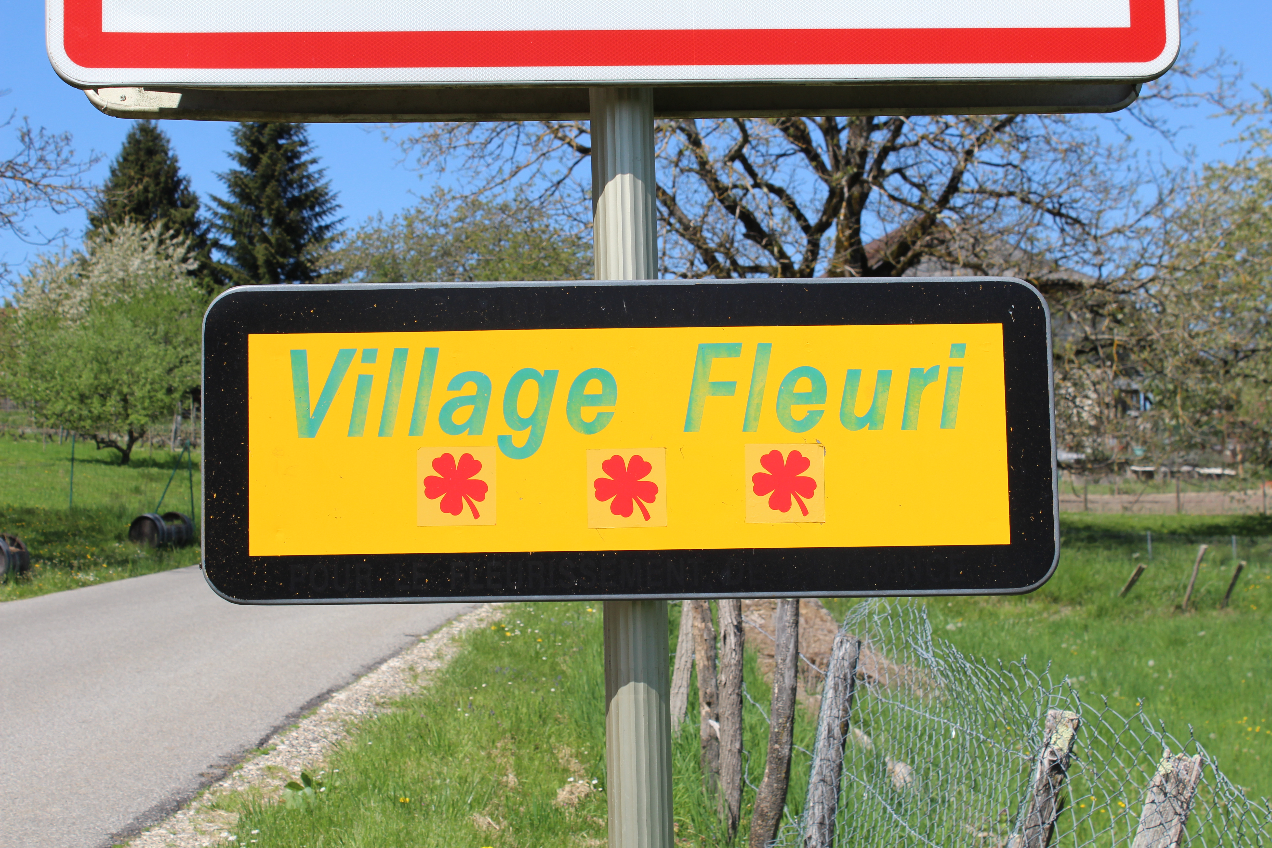 Panneau Village fleuri avec 3 fleurs dans Vongnes.